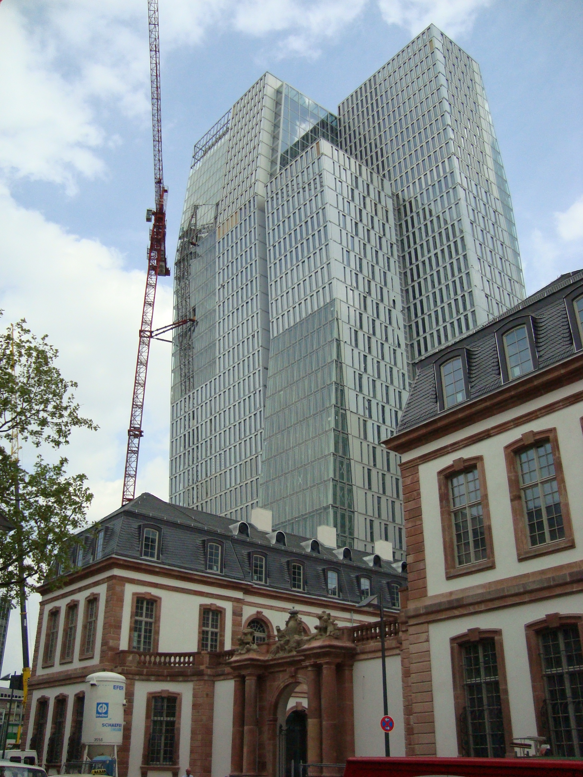 Das fast fertiggestellte PalaisQuartier im April 2009.